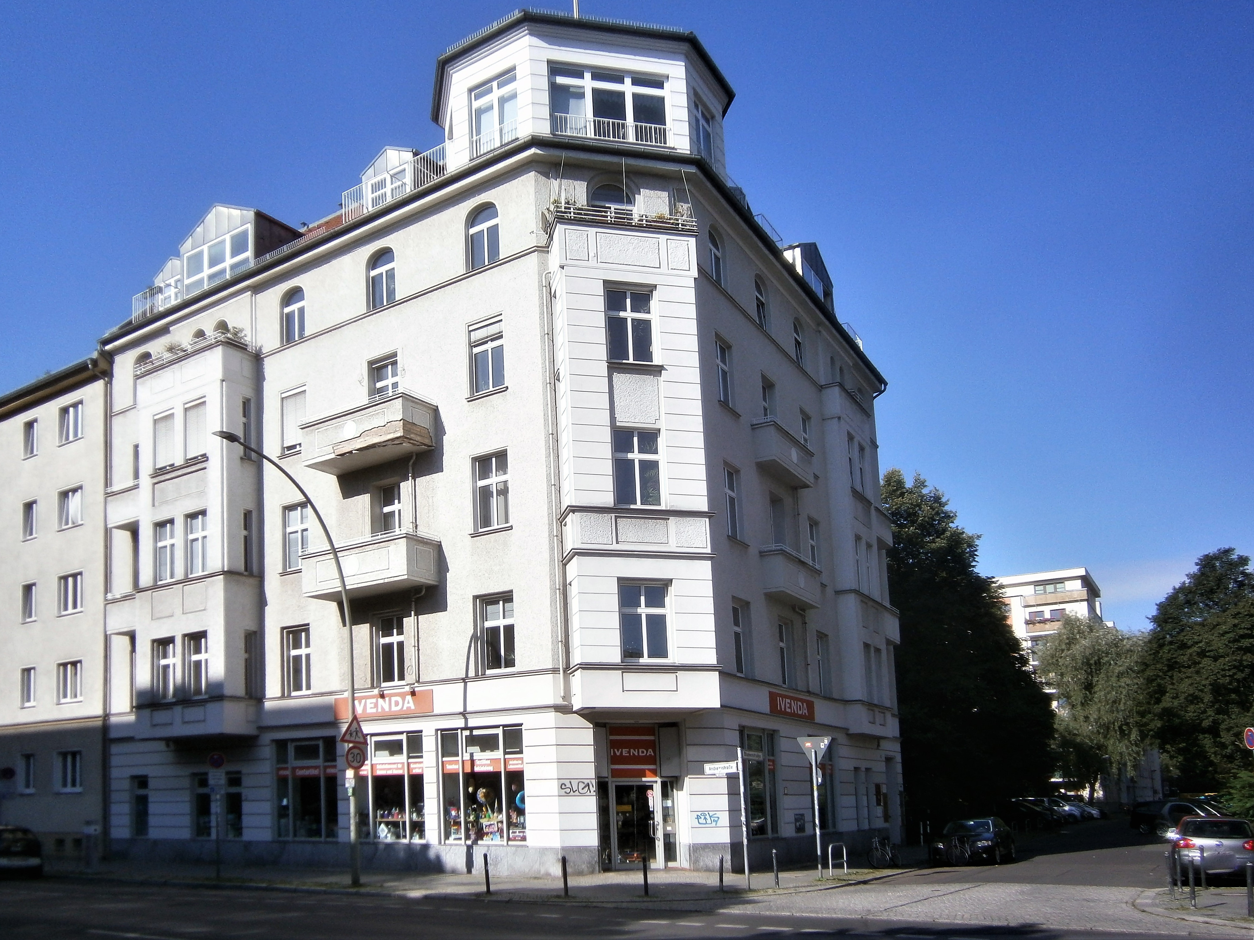 Die Andreasstraße ist eine Straße im Berliner Bezirk Friedrichshain-Kreuzberg, Ortsteil Friedrichshain. Angelegt wurde sie 1862 auf vorherigen Gartenland und 1863 benannt. Bis um 1900 waren die Grundstücke bebaut und bis 1930 wurde verdichtet. Bei Luftangriffen im Zweiten Weltkrieg wurde die Gebäude schwer getroffen. So ist die Straße seit den 1950er Jahren mit wiederhergestellten Altbauten, aber besondres durch Plattenbau-Wohnblöcke aber seit 1990 auch durch Hotel- und Bürobauten im Umfeld des Ostbahnhofs charakterieisiert. Das Bild zeigt: Das Eckhaus Andreas-/Blumenstraße hatte den Krieg am besten überstanden und nahm wohl Einfluss auf den Erhalt von Altbauten.